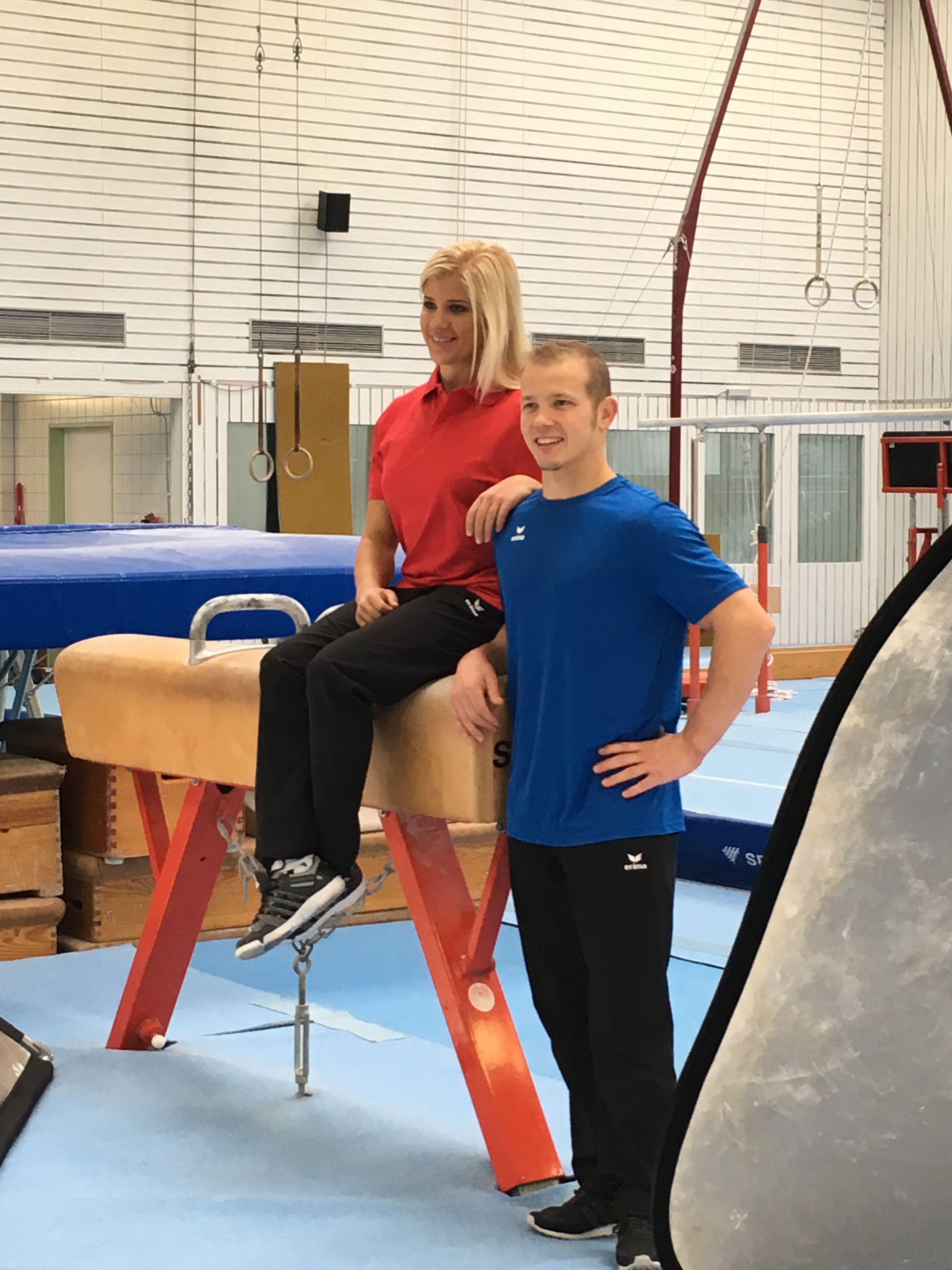 Elisabeth seitz zusammen mit ihrem Teamkollegen und Olympiasieger Fabian Hambüchen